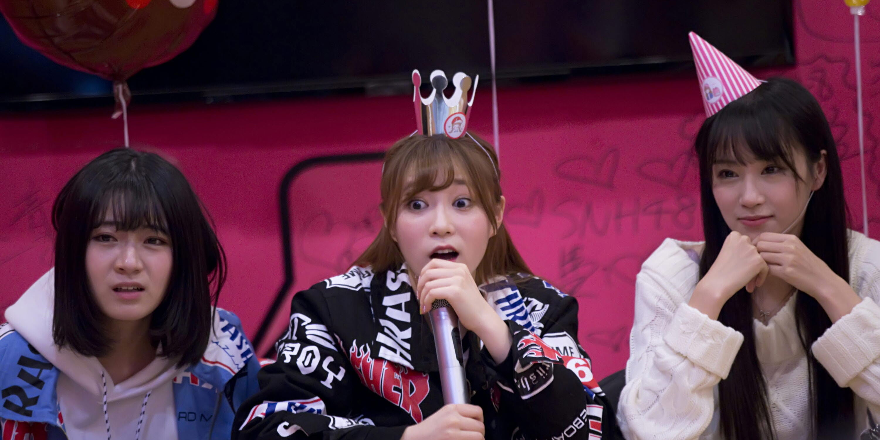 0109-冷餐 袁雨桢